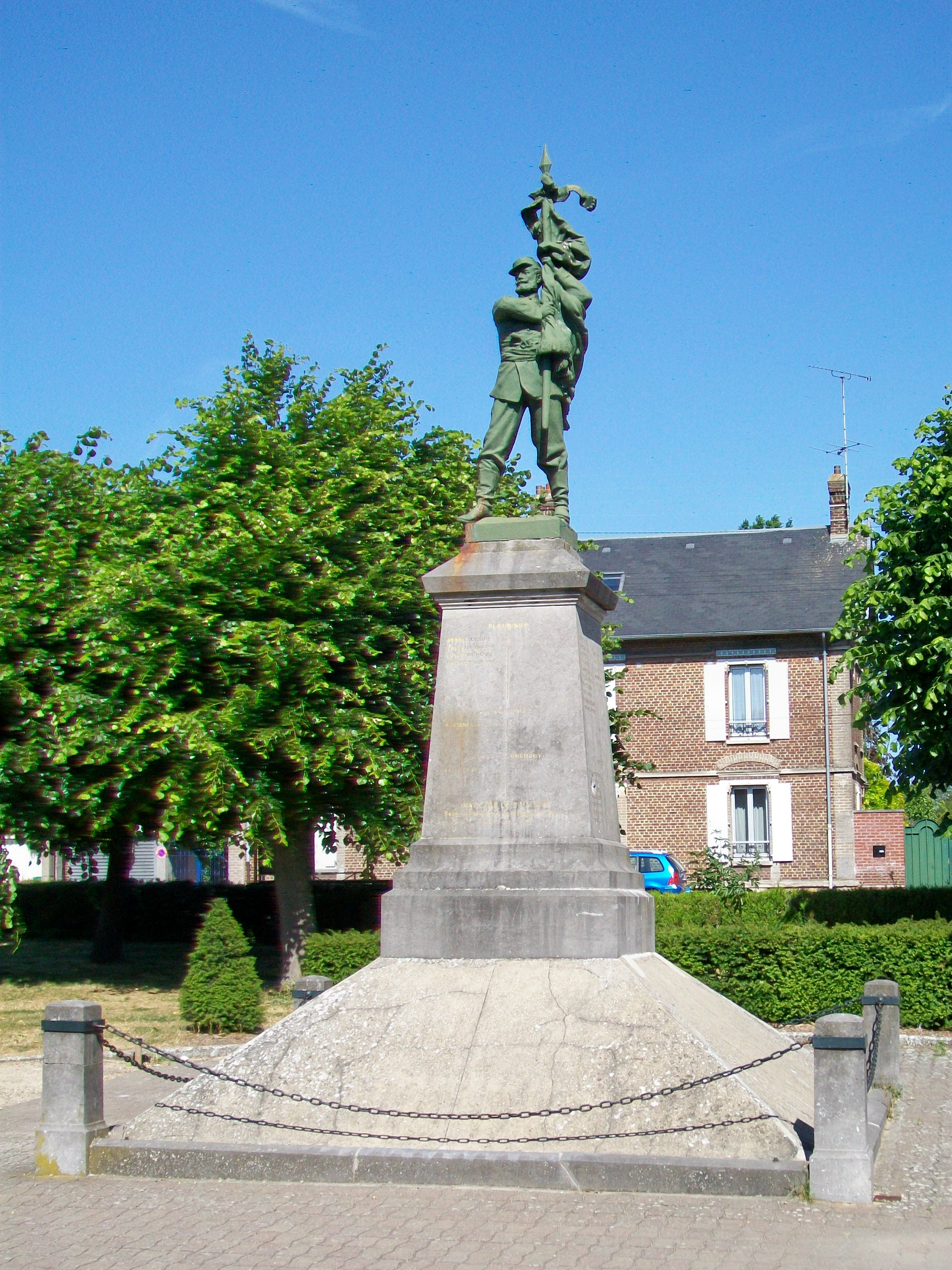 Le monument aux morts ou monument des Vétérans, place du maréchal de Lattre de Tassigny, jardin public sur la rive droite de l'Oise. Le monument a été inauguré le 5 mai 1907 à la gloire des soldats morts pour la patrie.